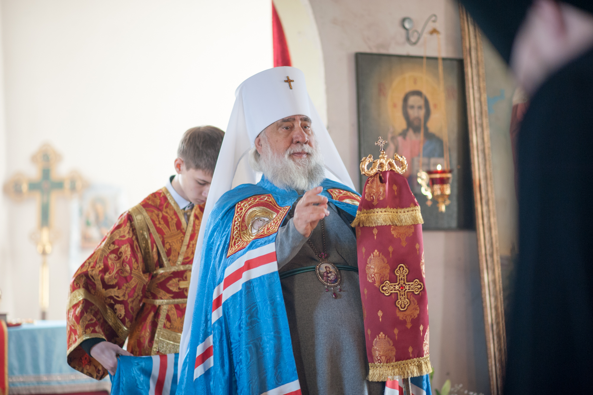 Митрополит Иона (Карпухин) перед Божественной литургией в Покрово-Болдинском монастыре г.Астрахань